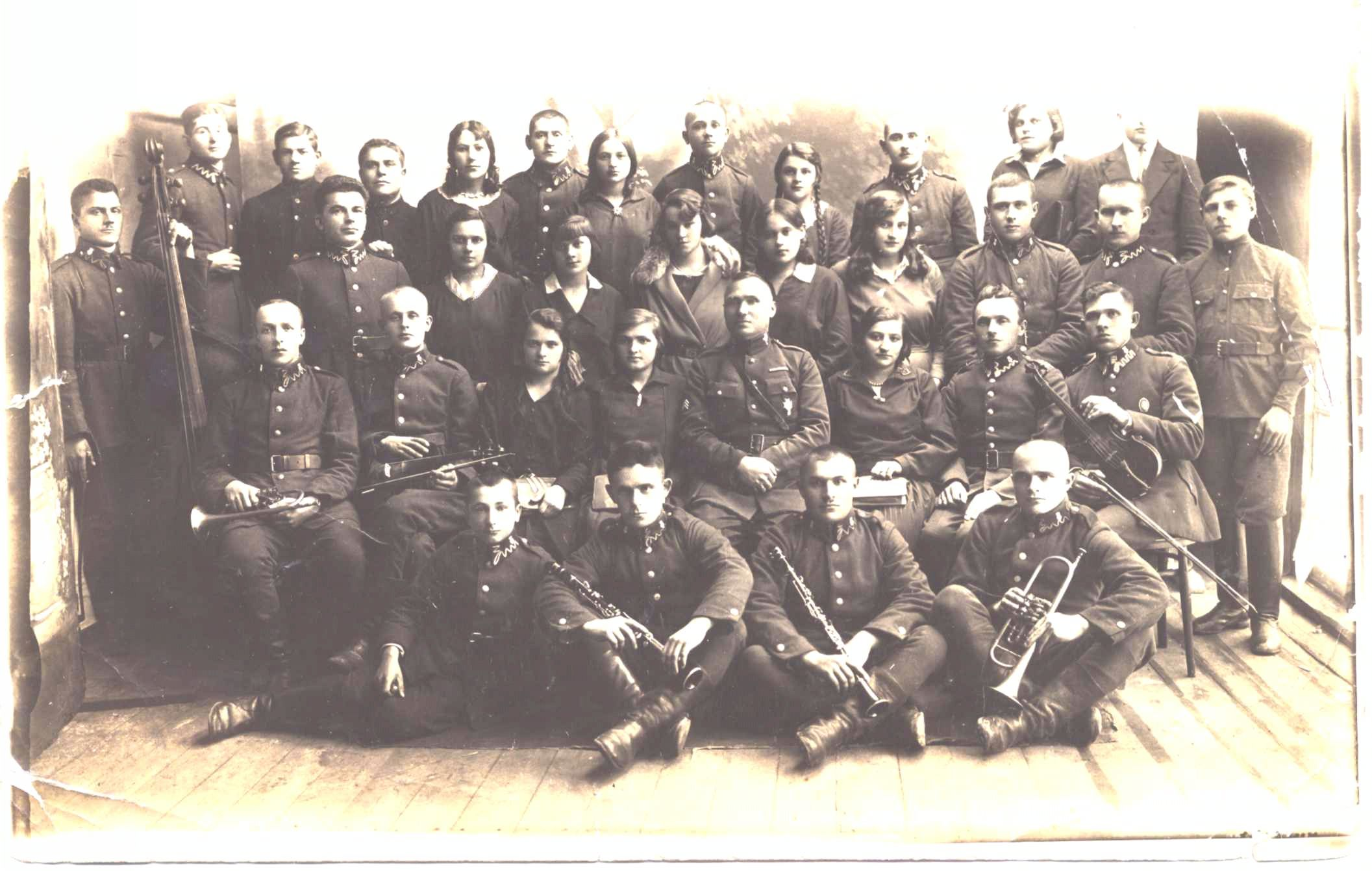 Zdjęcie Chóru "Lutnia" i orkiestry wojskowej 9 Batalionu Korpusu Ochrony Pogranicza w Klecku. Na zdjęciu po środku kapelmistrz Józef Sokołowski. Rok wykonania zdjęcia 1930-1932.